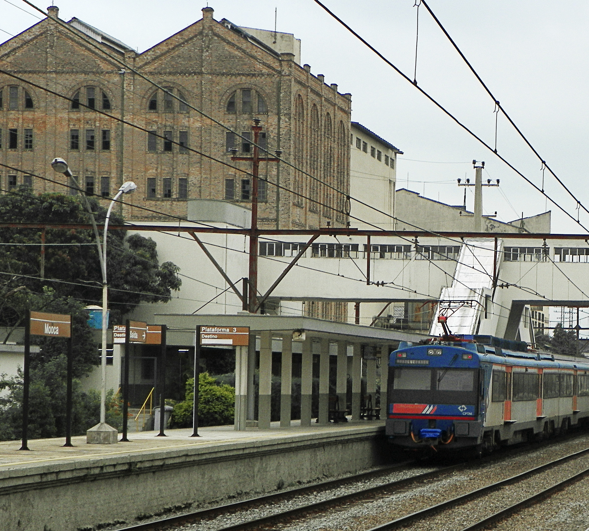 Galpões vistos da Estação Mooca, em São Paulo, Brasil.